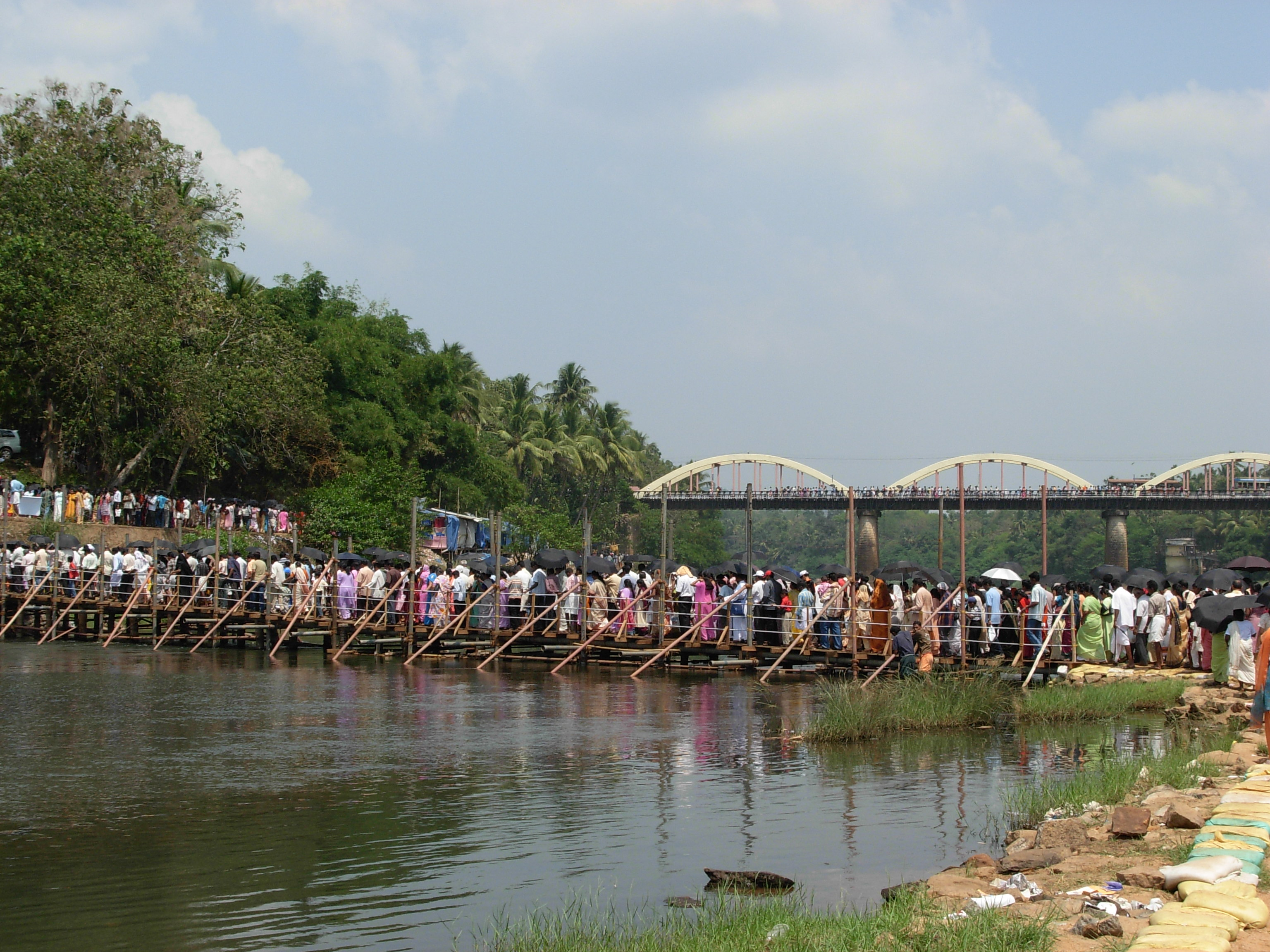 മാരാമൺ മണല്പുറത്തുനിന്നും മടങ്ങുന്ന വിശ്വാസികൾ